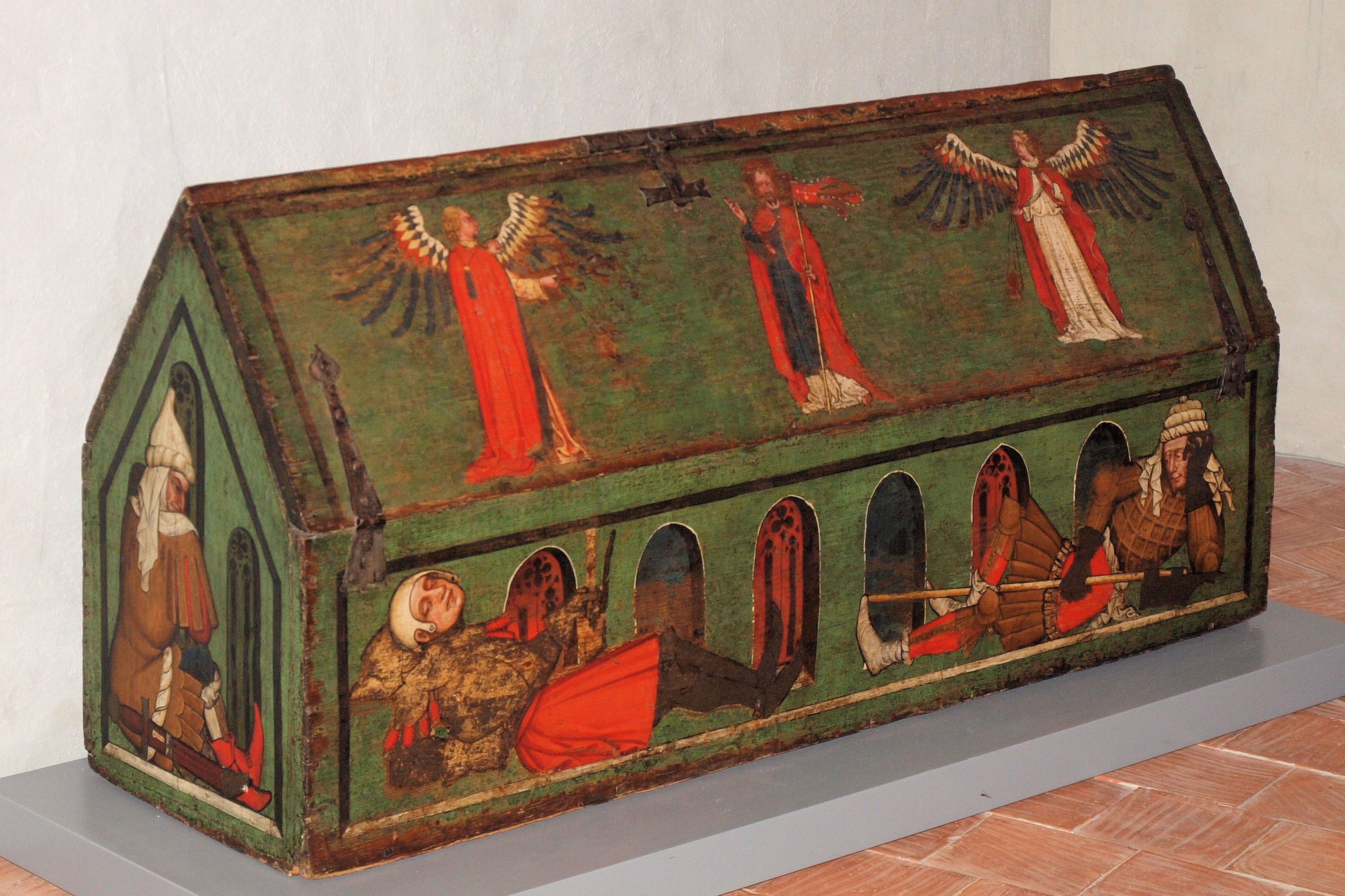 Die Heiligengrabtruhe von Baar ZG. Die um 1430 endstandene bemalte, hölzerne Heiligengrabtruhe, befindet sich heute im Museum Burg in Zug.